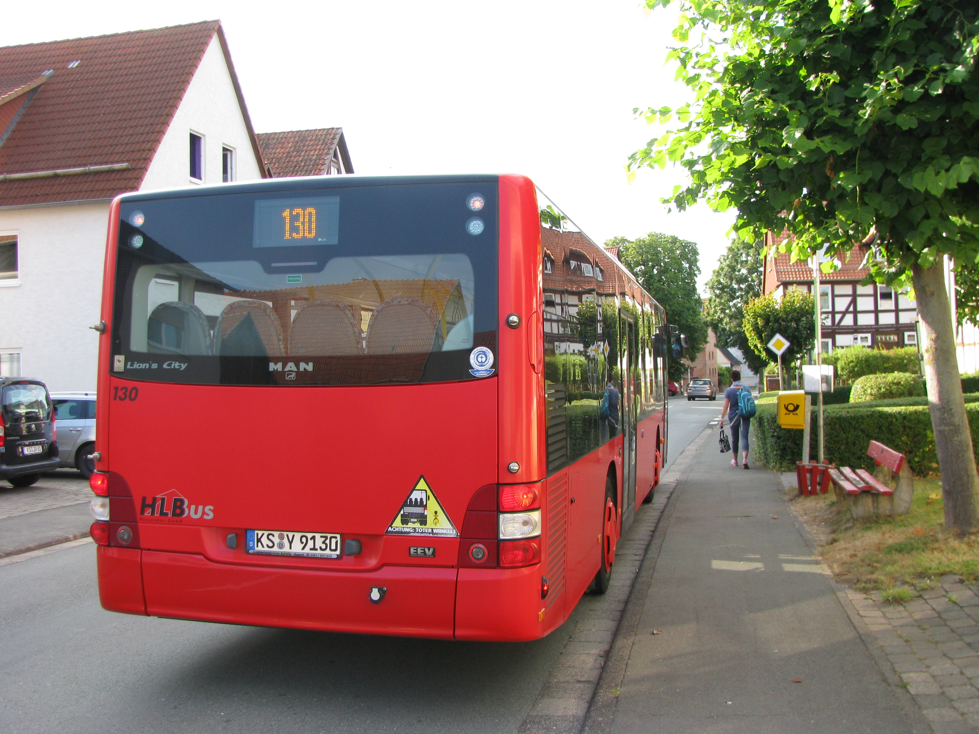 die Bushaltestelle Mitte in Calden-Westuffeln in Fahrtrichtung Obermeiser